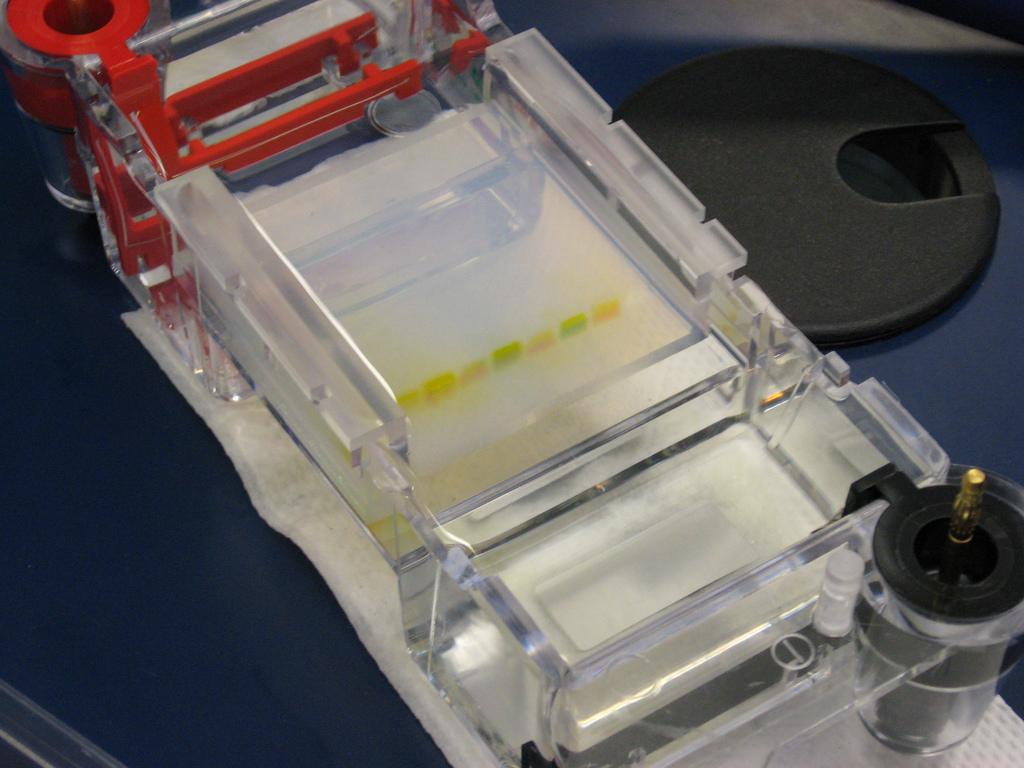 Agarose gel electrophoresis.